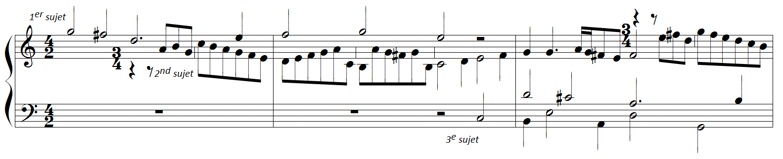 Anton Reicha - fugue n°30 des 36 fugues, op.36 à trois sujets